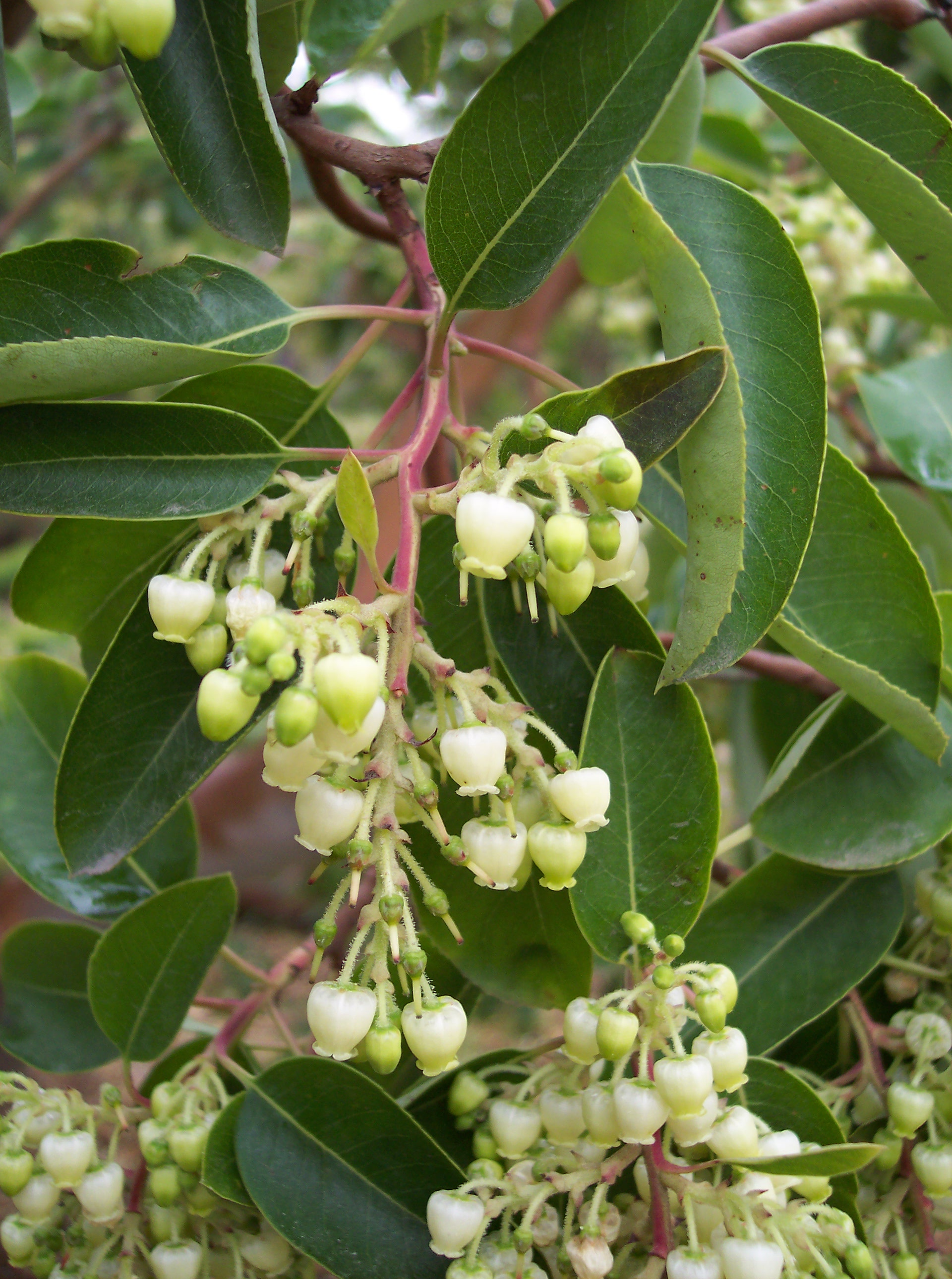 Arbutus andrachne. Flowers. Real Jardín Botánico de Madrid (40°24′39.09″N 3°41′29.05″W / 40.4108583°N 3.6914028°W).